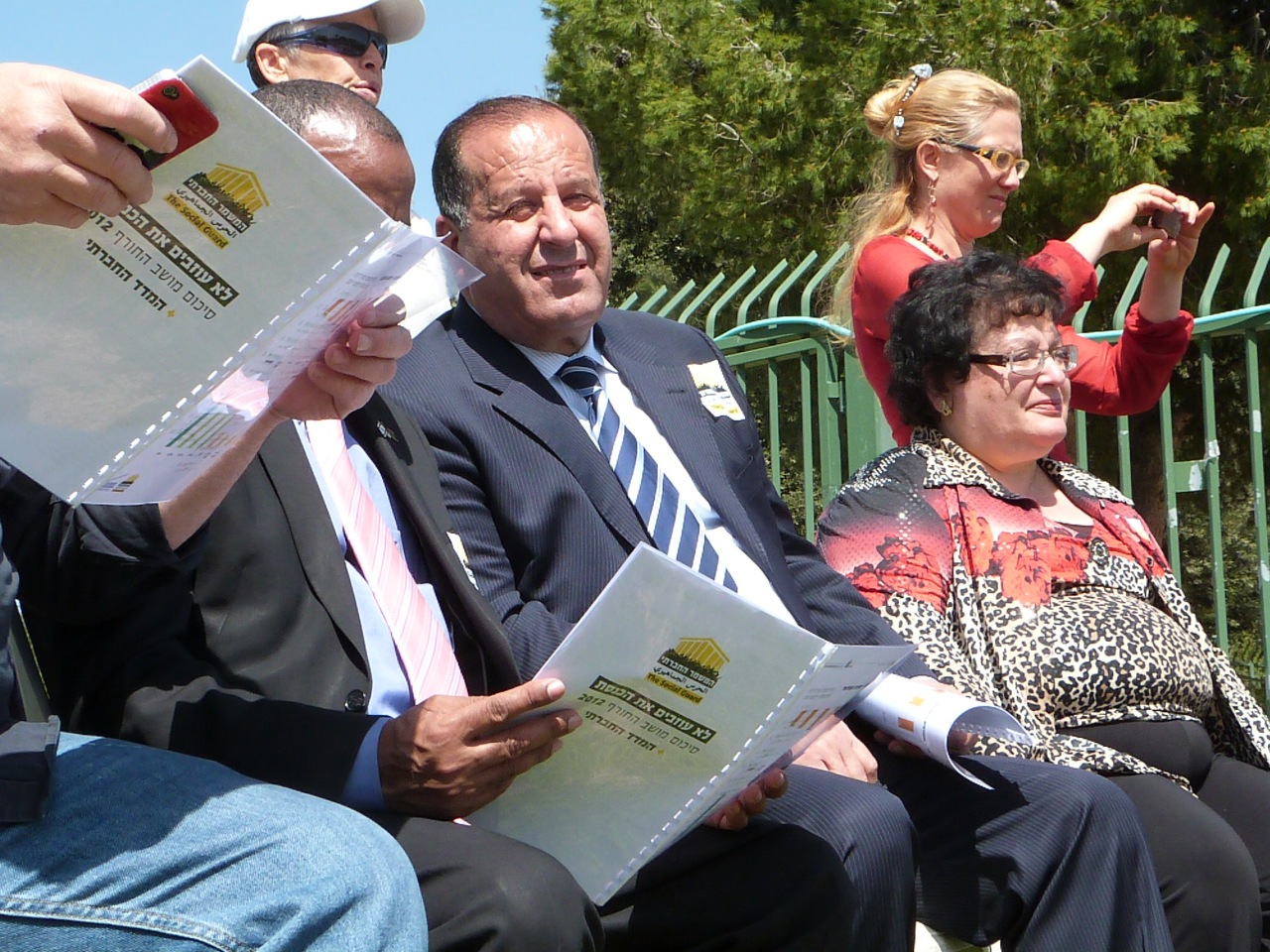 טקס הענקת המדד החברתי הראשון, מרינה סולודקין ומגלי והבה